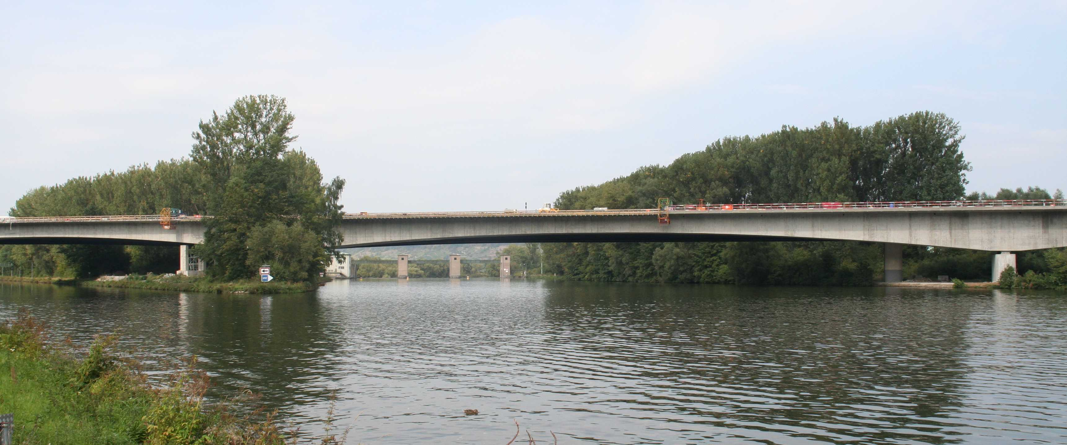 Mainbrücke Eltmann Bundesautobahn A70 bei Eltmann Brückenabschnitt der Spannbetonbrücke über dem Wehrarm, links Schleusenvorhafen